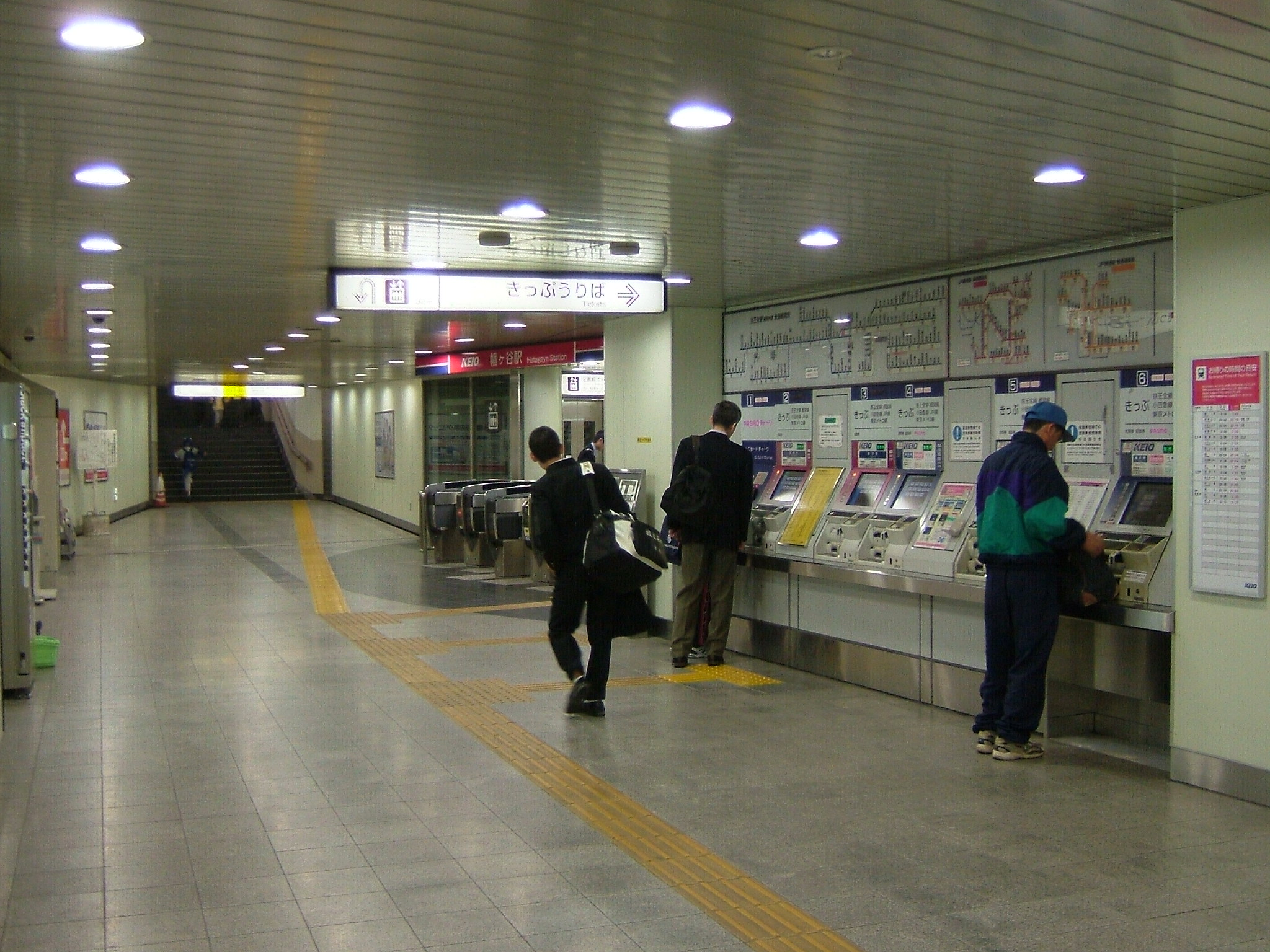 京王線幡ヶ谷駅きっぷ自動販売機